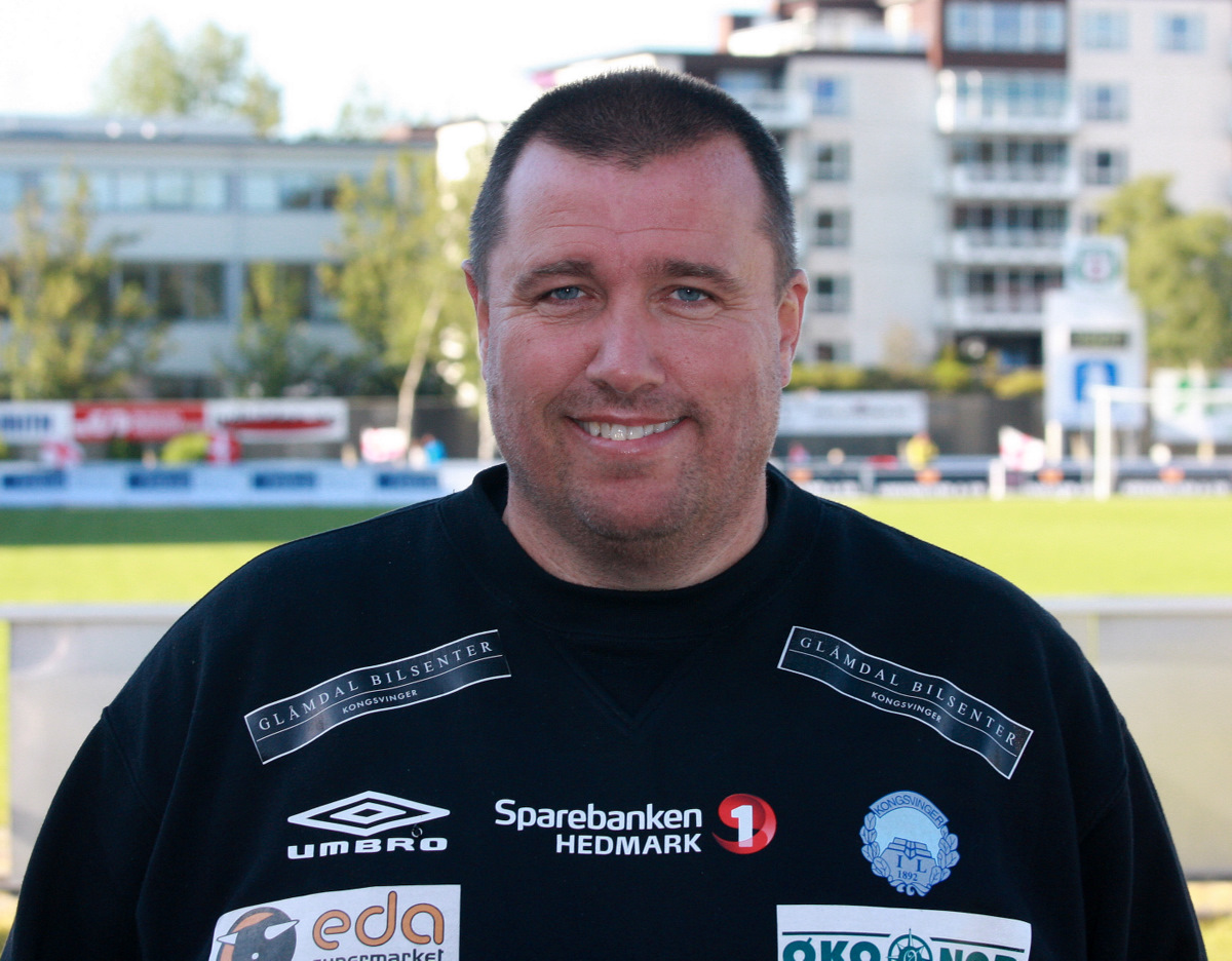 Tom Nordlie at Bryne stadion